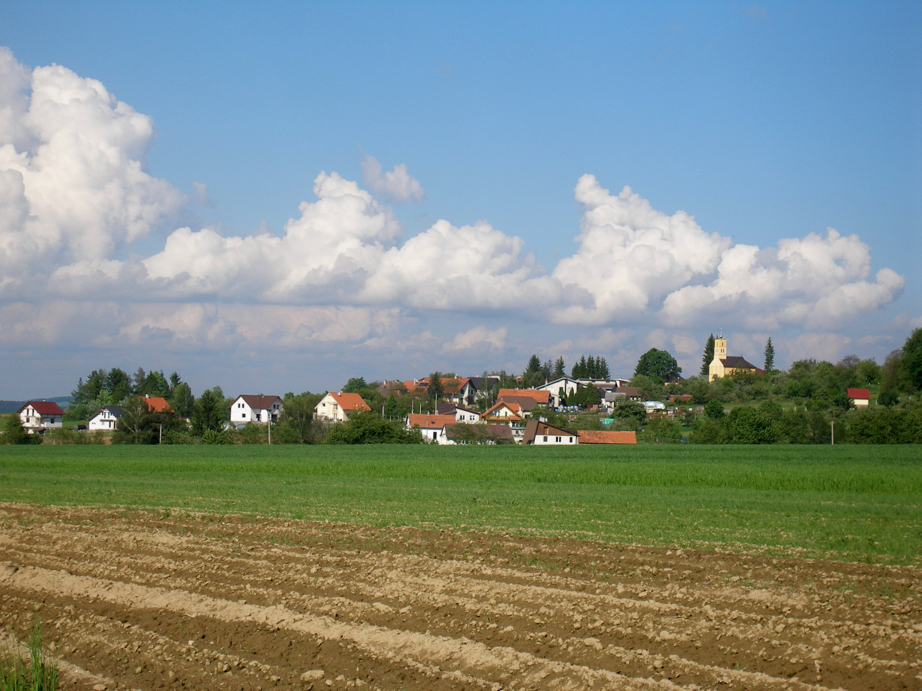 Severná je miestnou časťou obce Vyšná Šebastová a leží v severnom okraji Košickej kotliny, na úpätí Slanských vrchov vo vzdialenosti asi 3 km od Prešova.